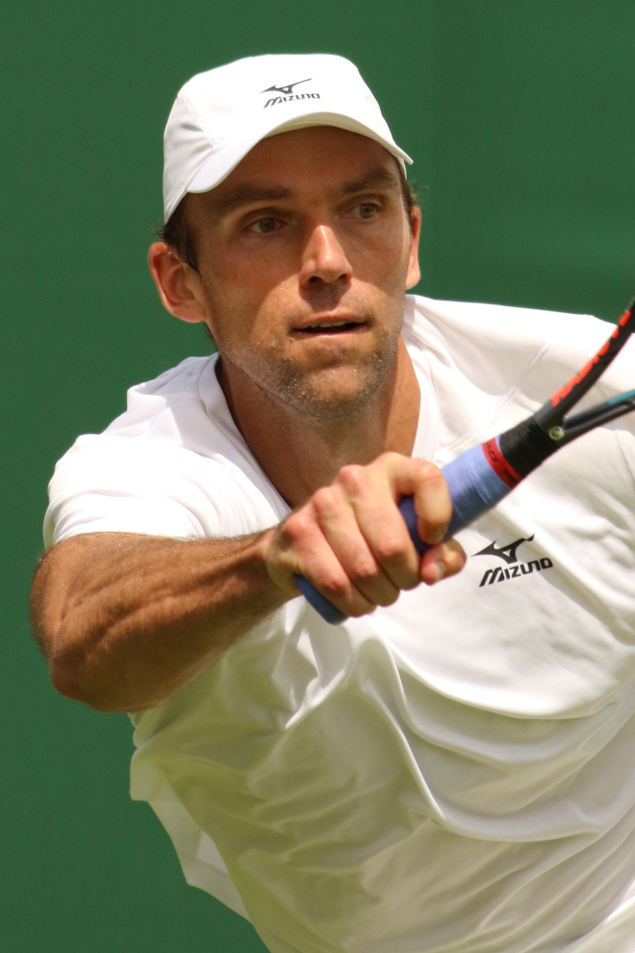 Karlovic WM16 (14)